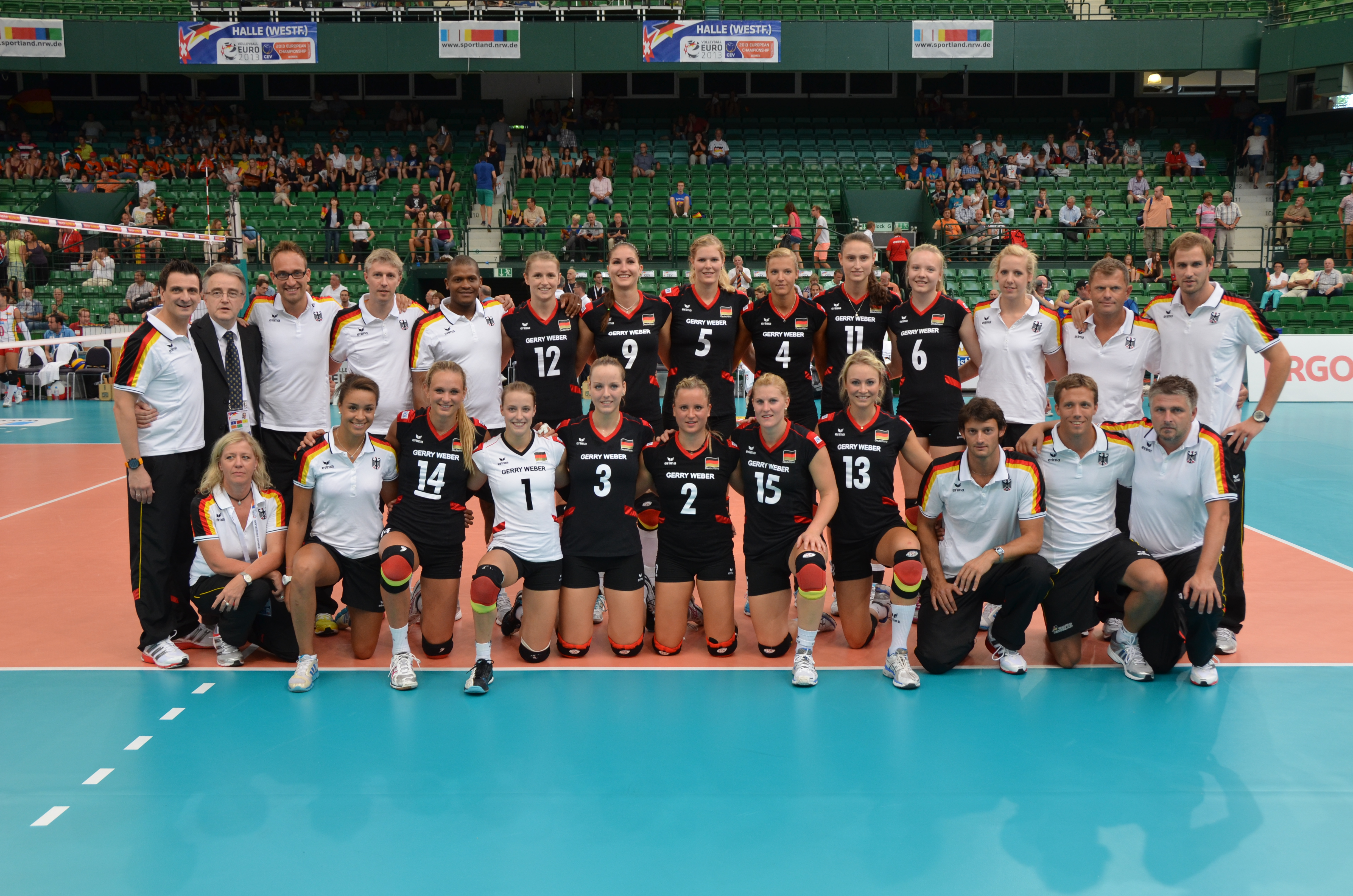 Volleyball-Europameisterschaft der Frauen 2013-Spielort Halle (Westf) Gerry-Weber-Stadion - Spiel 6. September 2013 (Deutschland-Spanien)